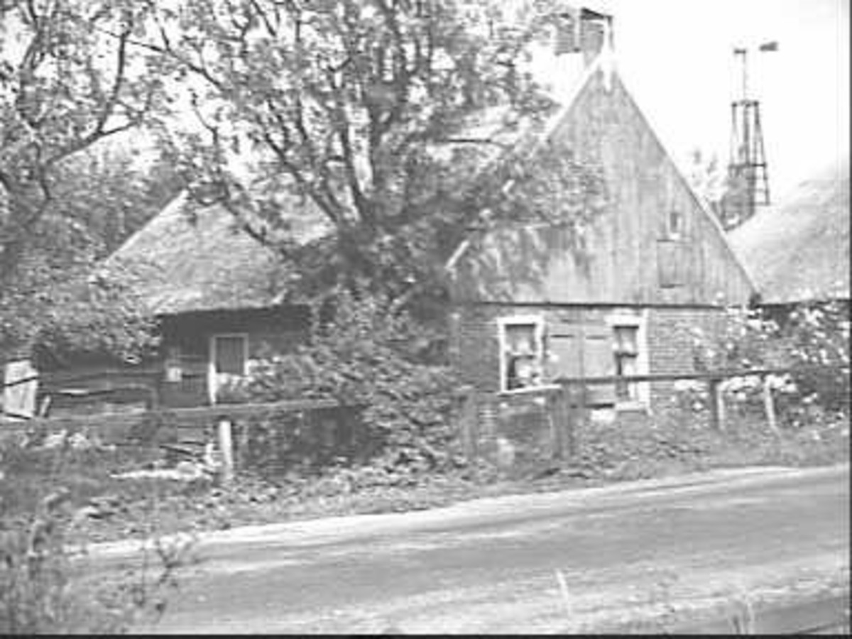 Weidegebied/ Boerderijen: zij- en voorgevel (opmerking: Deze afbeelding hebben wij helaas alleen in deze lage resolutie.)